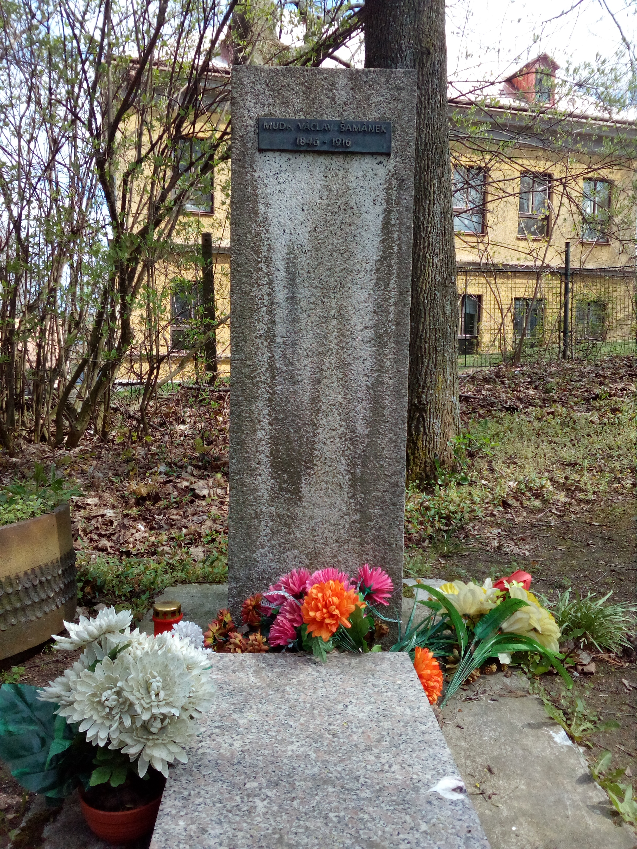 Václav Šamánek - náhrobek u libereckého krematoria, fotografováno v dubnu 2019